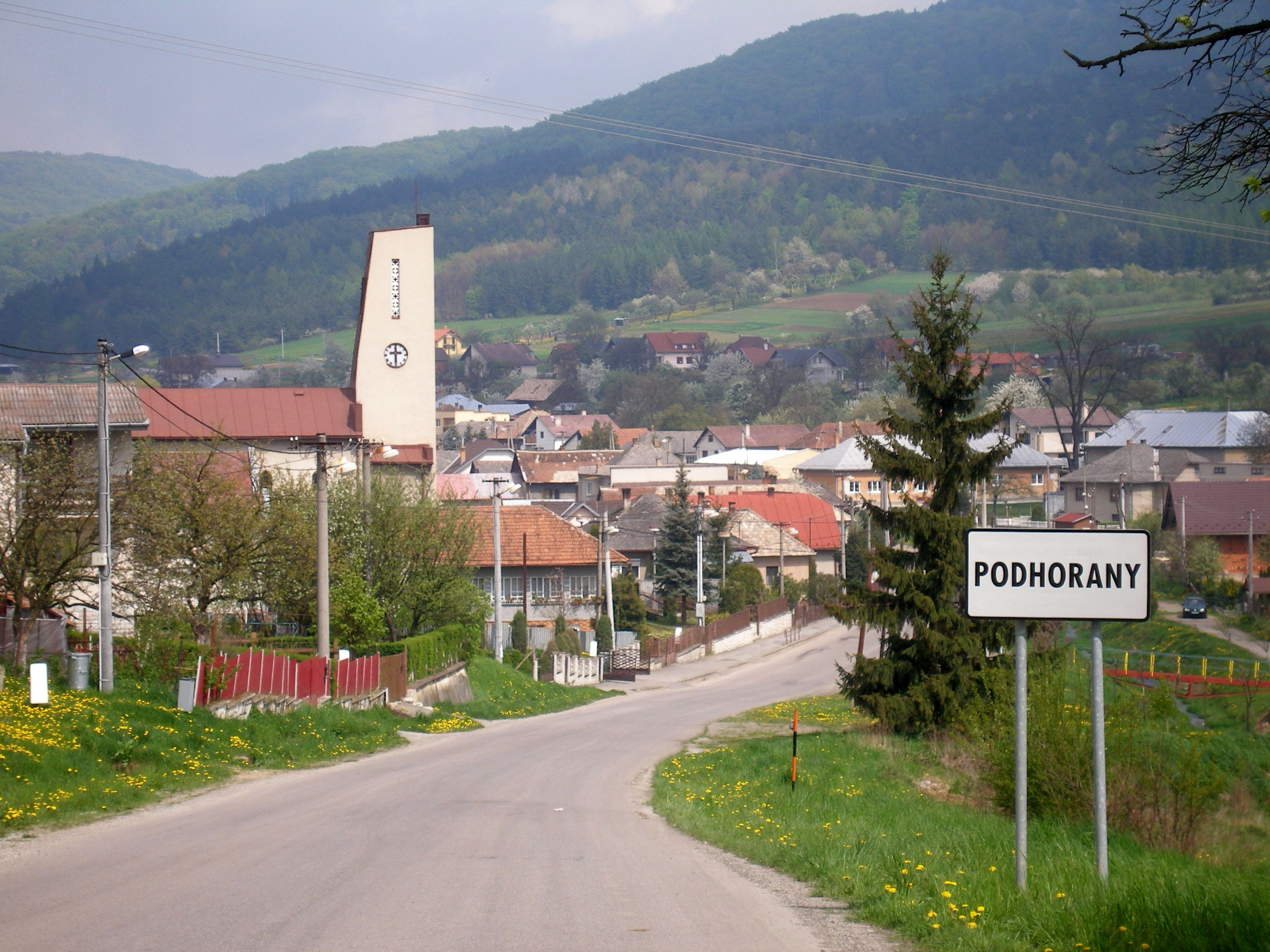 Obec Podhorany okres Prešov región Šariš